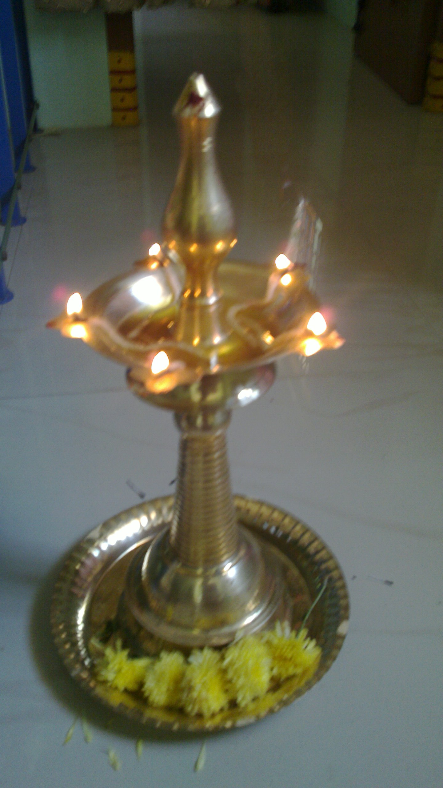 ஒளிவிளக்கு